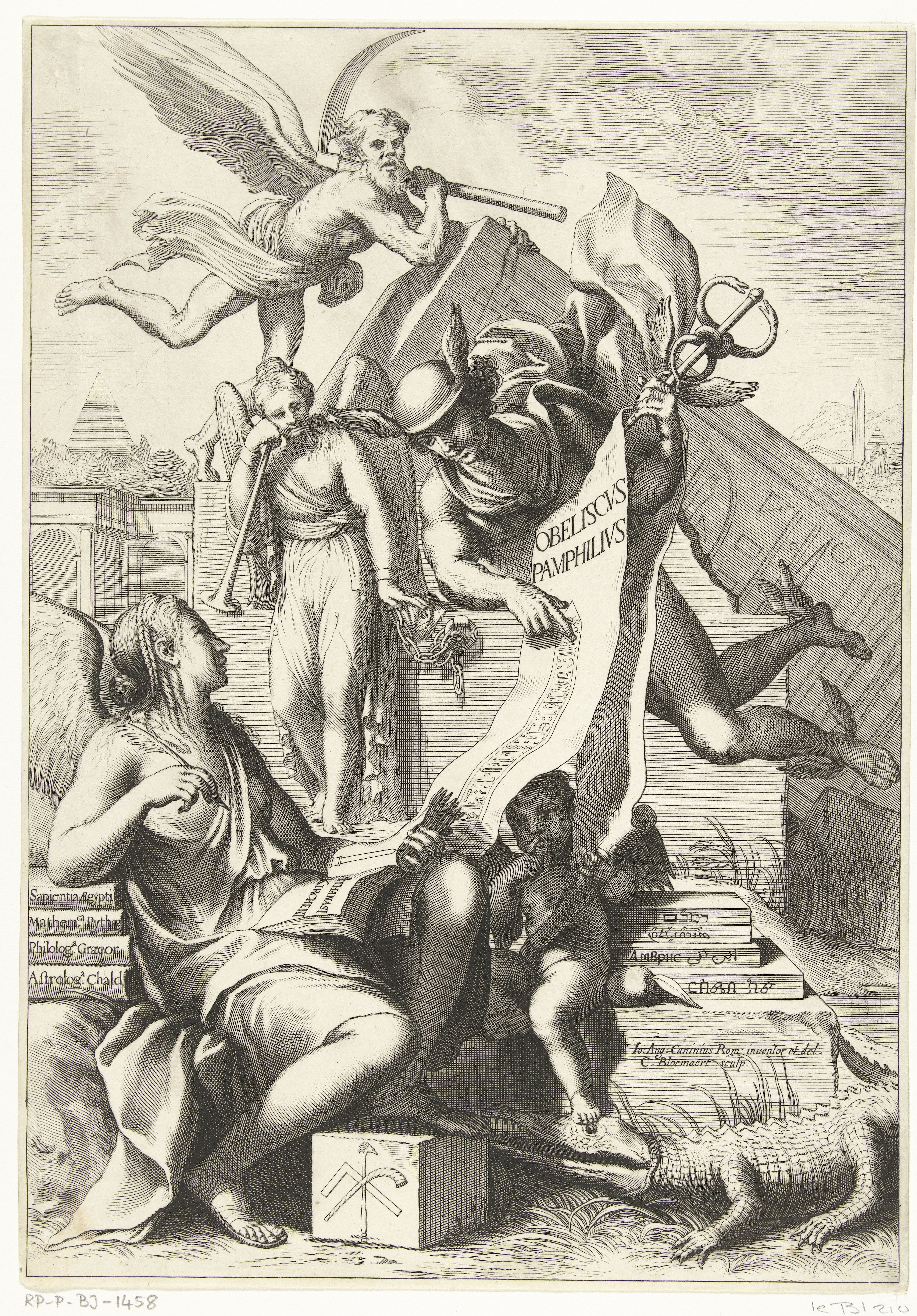 IdentificatieTitel(s): Mercurius ontdekt de geschiedenis van het mysterie van EgypteTitelpagina voor: A. Kircher, Obeliscvc Pamphilivs, Rome: 1650Objecttype: prent titelpagina Objectnummer: RP-P-BI-1458Catalogusreferentie: Hollstein Dutch 210Opschriften / Merken: verzamelaarsmerk, verso, gestempeld: Lugt 240Omschrijving: Mercurius komt aanzweven met gevleugelde voeten en de gevleugelde petasus. In zijn hand houdt hij de caduceus vast. Over de caduceus hangt een banier met tekst. Een jongedame, lezend in een boek, kijkt naar hem op en luistert naar zijn uitleg.VervaardigingVervaardiger: prentmaker: Cornelis Bloemaert (II) (vermeld op object)naar tekening van: Giovanni Angelo Canini (vermeld op object)naar ontwerp van: Giovanni Angelo Canini (vermeld op object)Plaats vervaardiging: RomeDatering: 1650Fysieke kenmerken: gravureMateriaal: papier Techniek: graveren (drukprocedé)Afmetingen: blad: h 295 mm × b 208 mmToelichtingtitelpagina voor: Athanasius Kircher, Obeliscvs Pamphilivs, hoc est, Interpretatio noua & hucusque intentata obelisci hieroglyphici, Romæ, : typis Ludouici Grignani, 1650.OnderwerpWat: non-aggressive, friendly or neutral activities and relationships of Mercurytitle-pageWie: Athanasius KircherVerwerving en rechtenVerwerving: overdracht van beheer 1816Copyright: Publiek domein